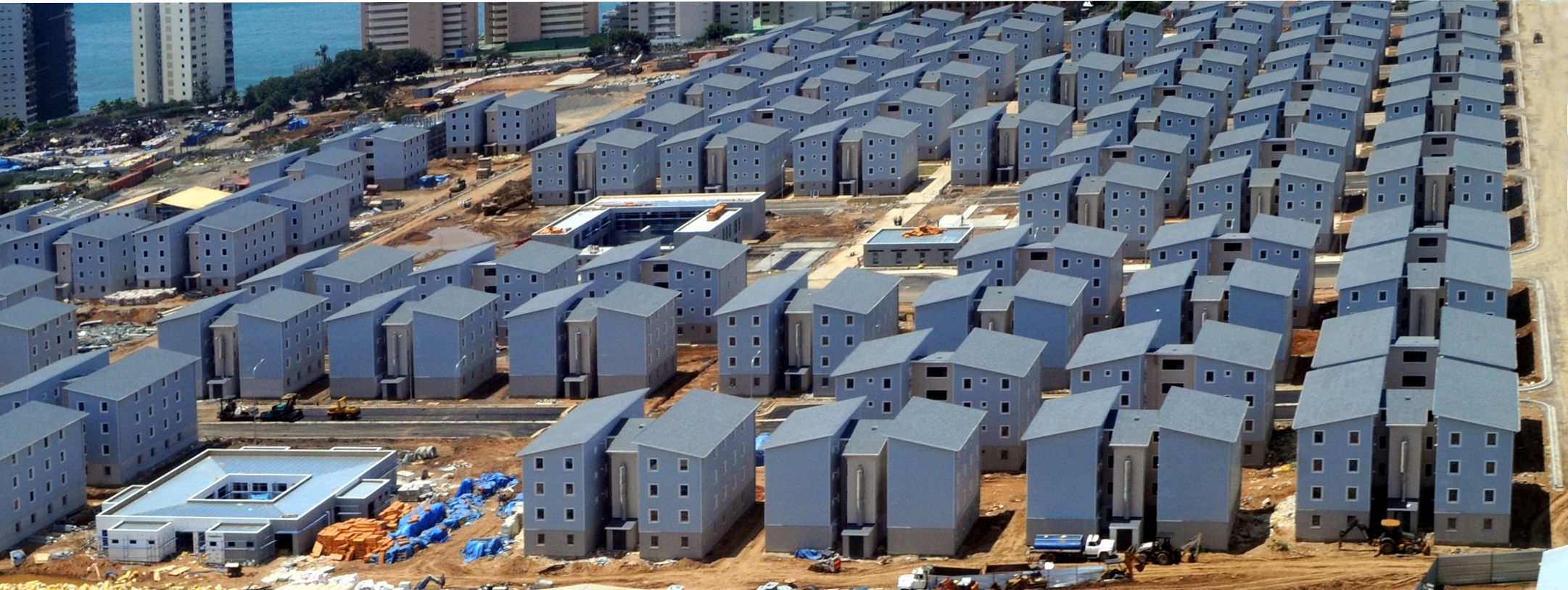 Casas construidas por el Gobierno del Presidente Chavez en La Guaira, Venezuela. Fotografía tomada desde un un avión mientras despegaba del Aeropuerto Internacional Simón Bolívar de Maiquetia.